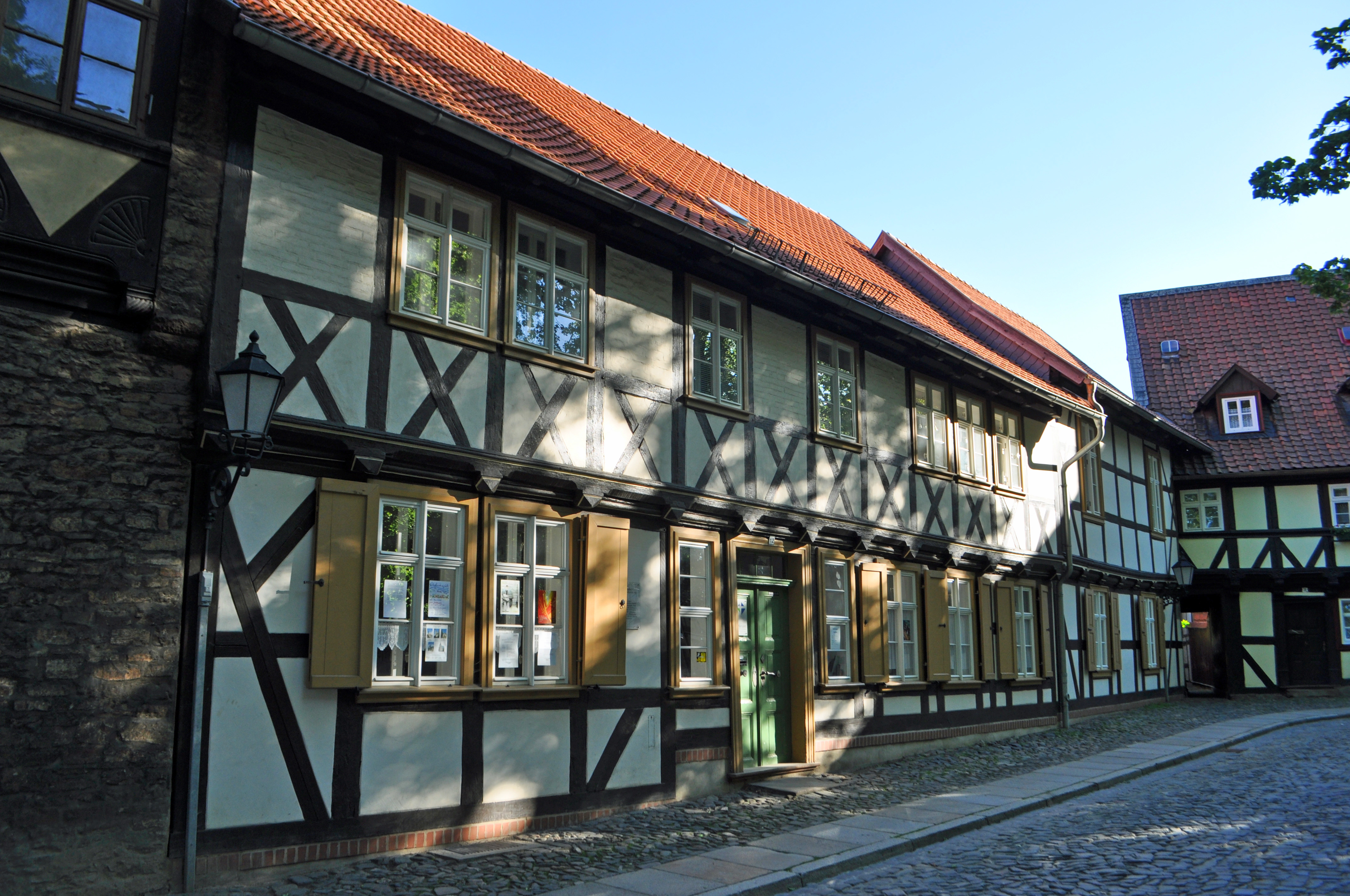 Wernigerode, Häuser am Oberpfarrkirchhof 12